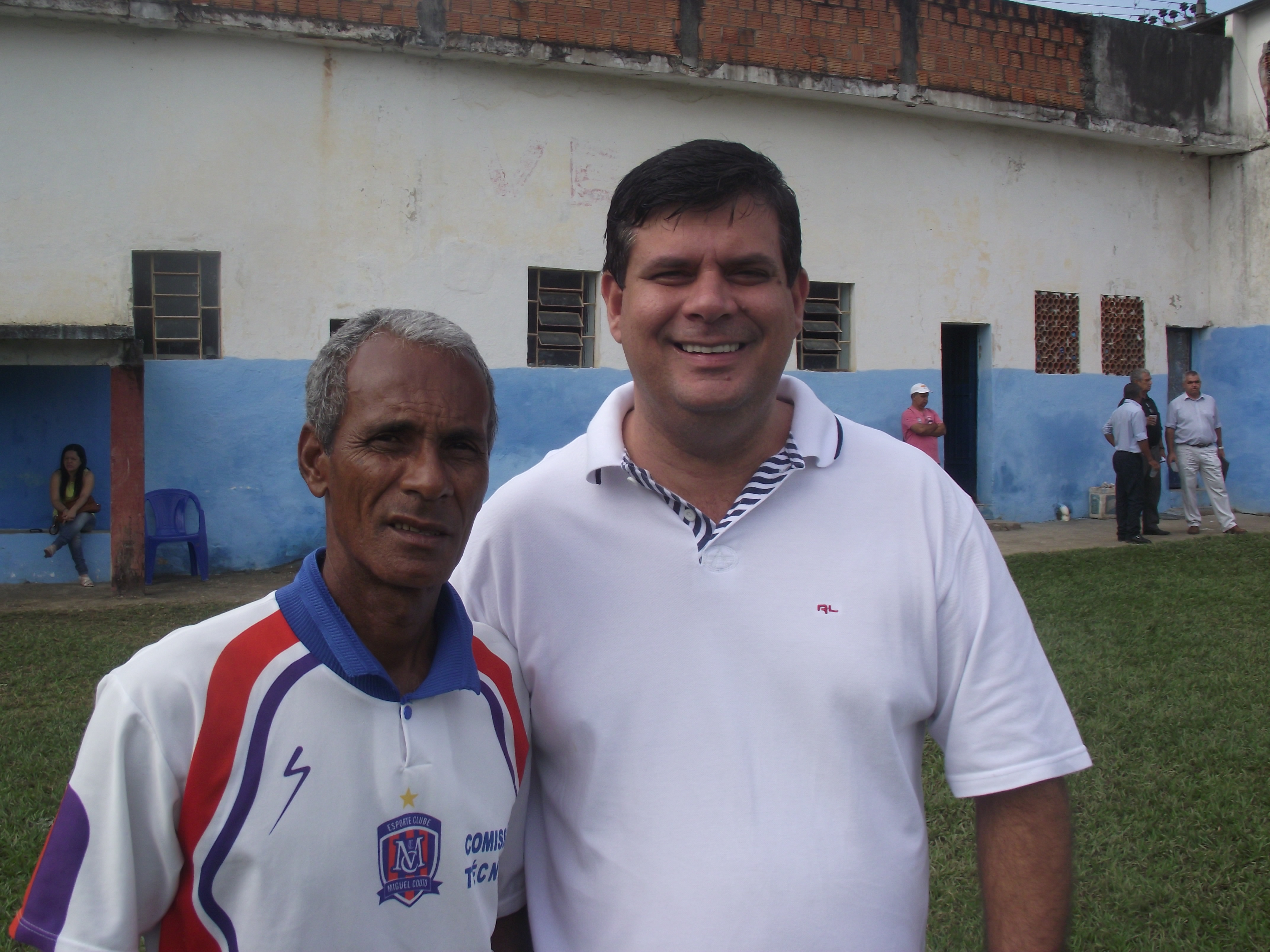 Zila Cardoso, dirigente do Miguel Couto e o vereador Carlinhos, o presidente.